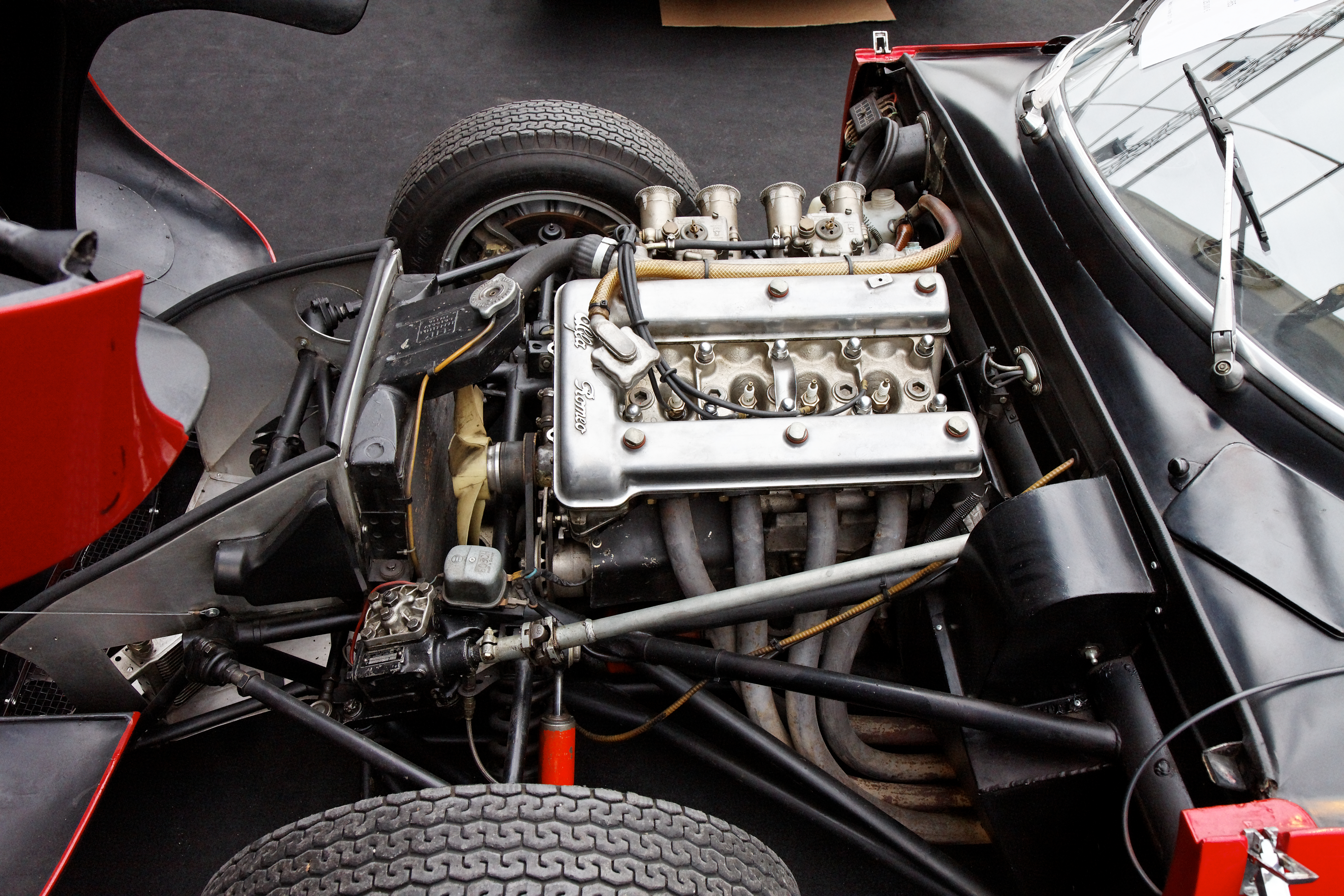 Alfa Romeo TZ - Festival Automobile International 2011 - Vente aux enchères